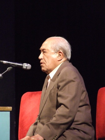 Ahmad Ebrahimi-khanande-احمد ابراهیمی